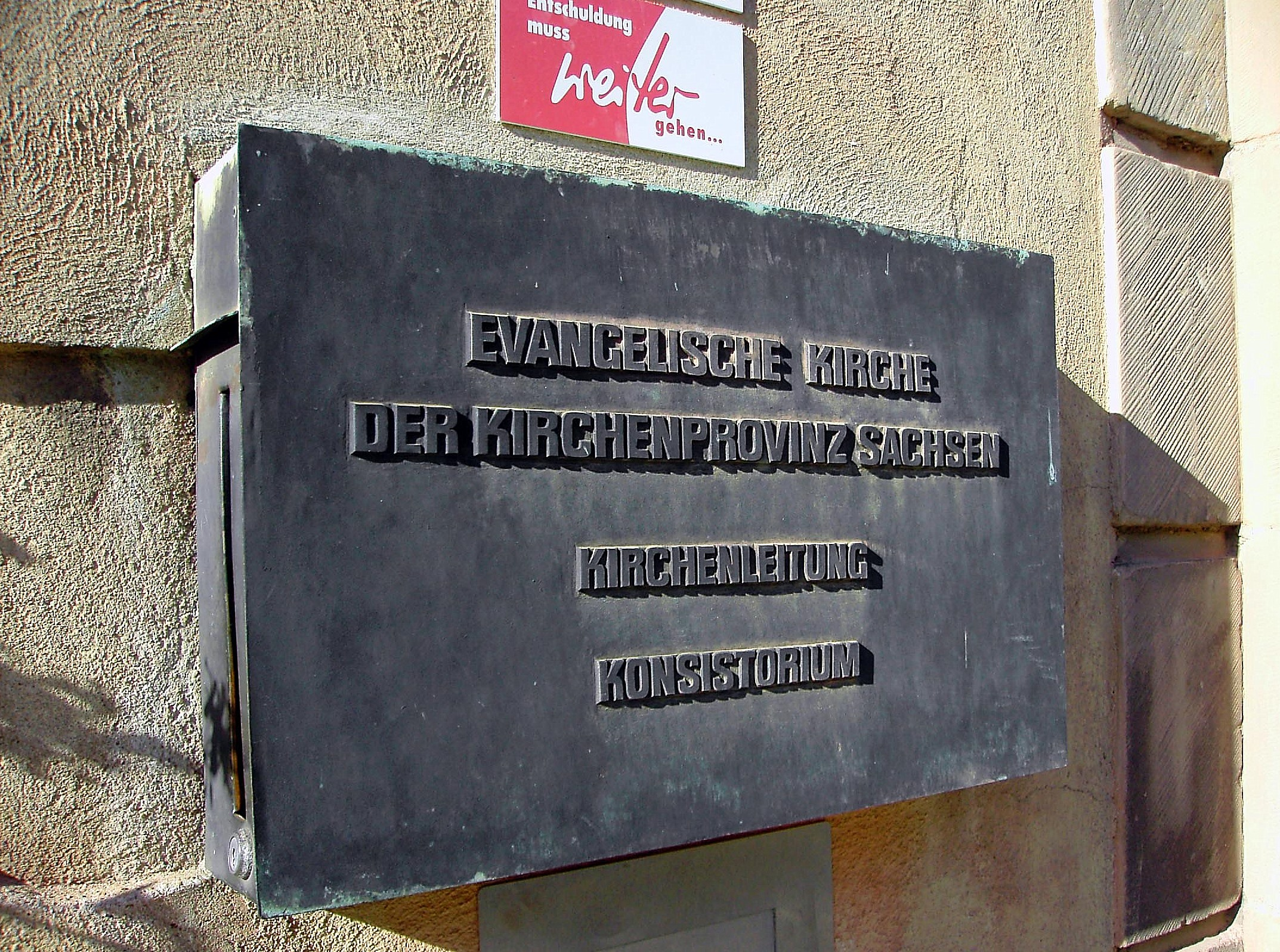 Tafel am Verwaltungsgebäude der EvK Sachsen in Magdeburg